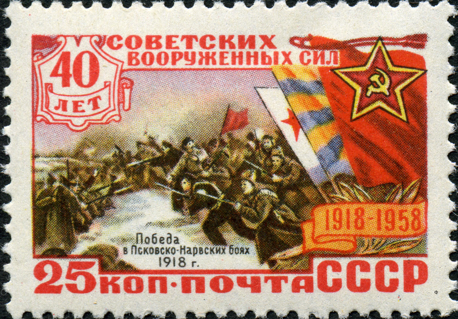 Марка СССР